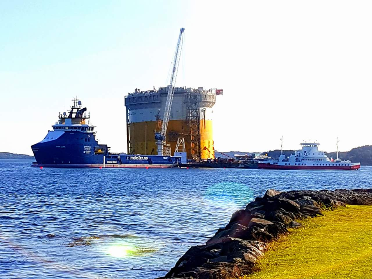 Understellet til Aasta Hansteen plattformen i Digernessundet i juli 2017.